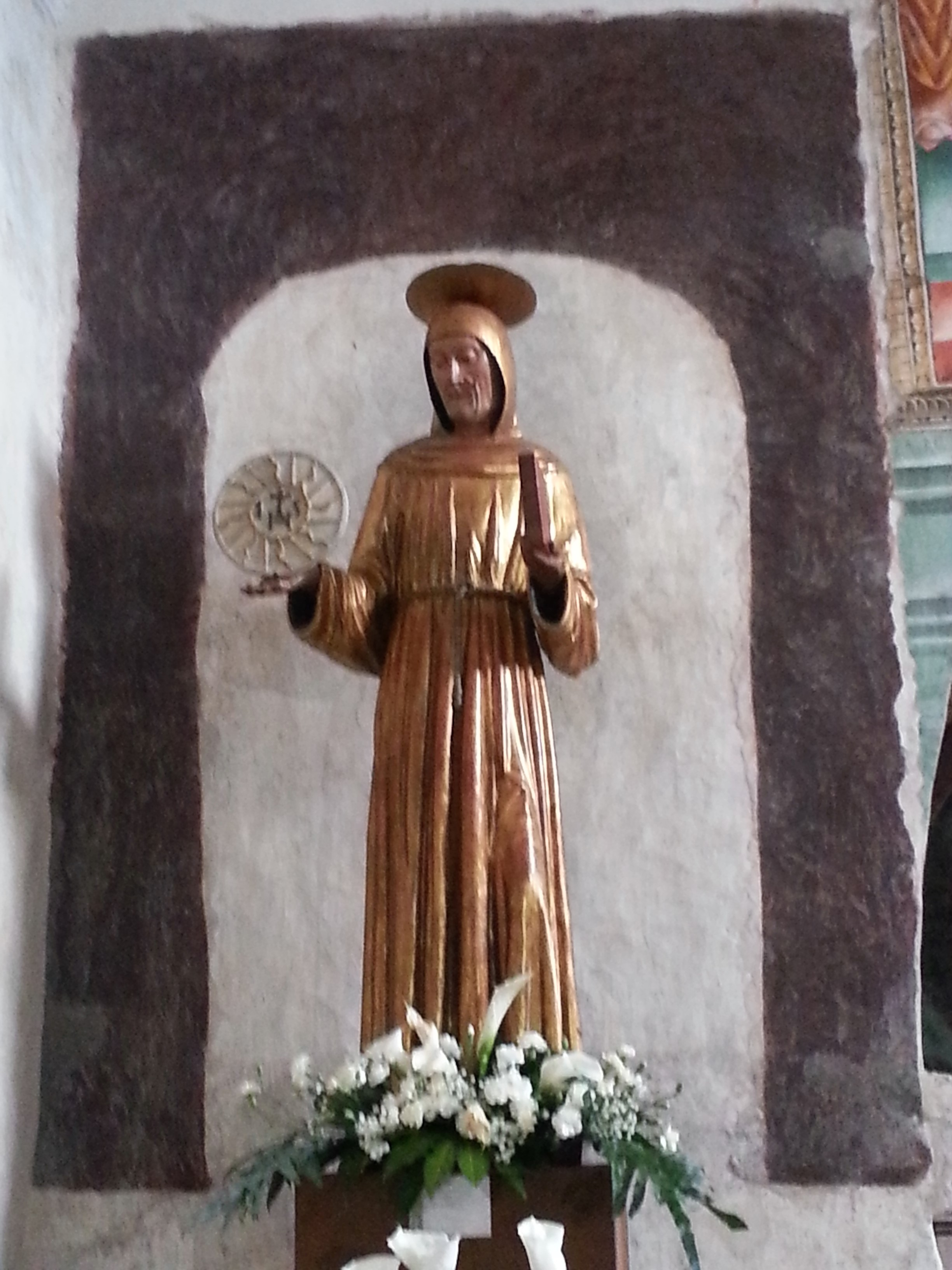 San Bernardino da Siena - Oratorio dei disciplini- Francesco Balinzeri